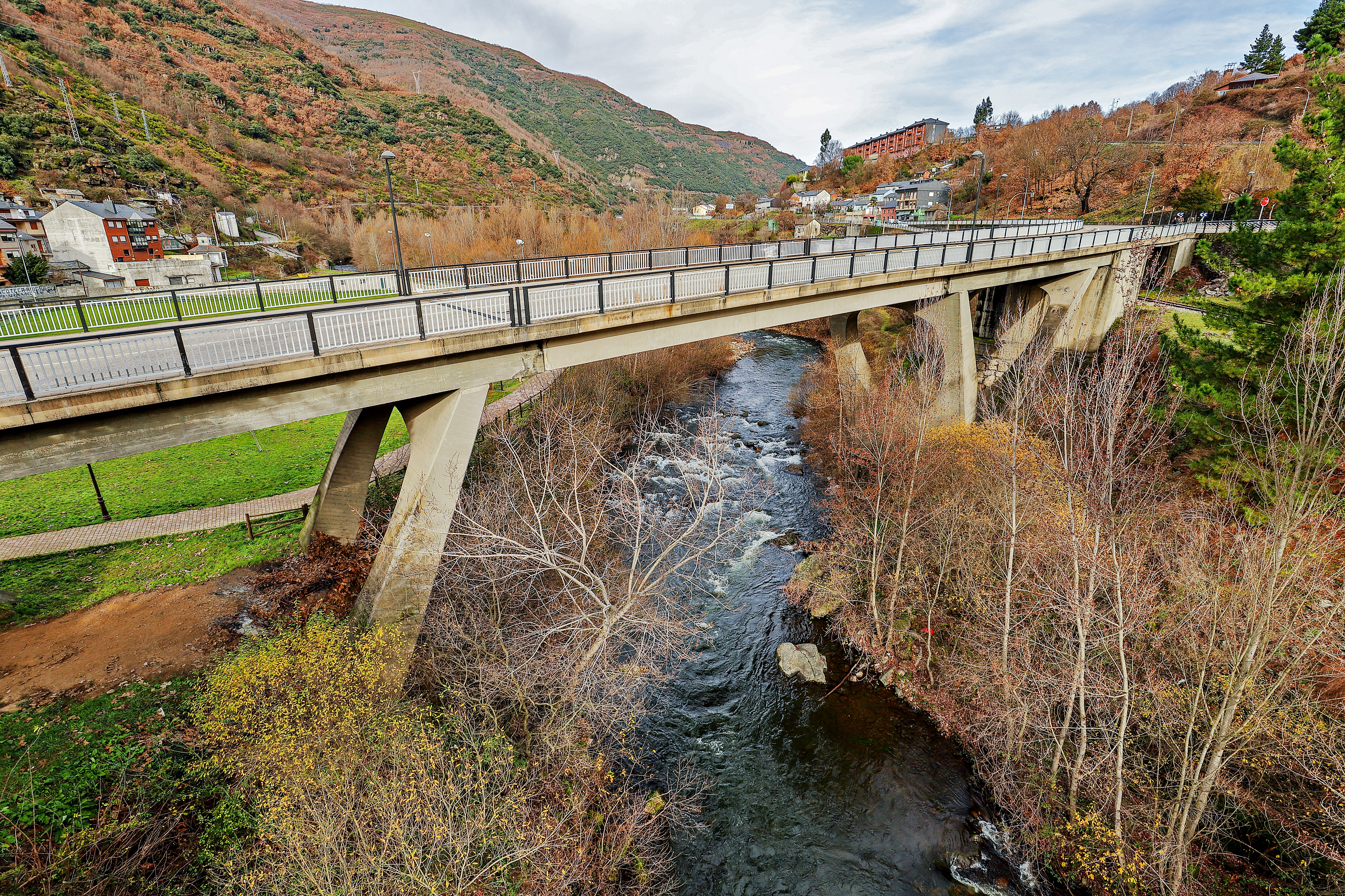 Matarrosa del Sil es una localidad que pertenece al municipio de Toreno, en la comarca de El Bierzo, provincia de León.